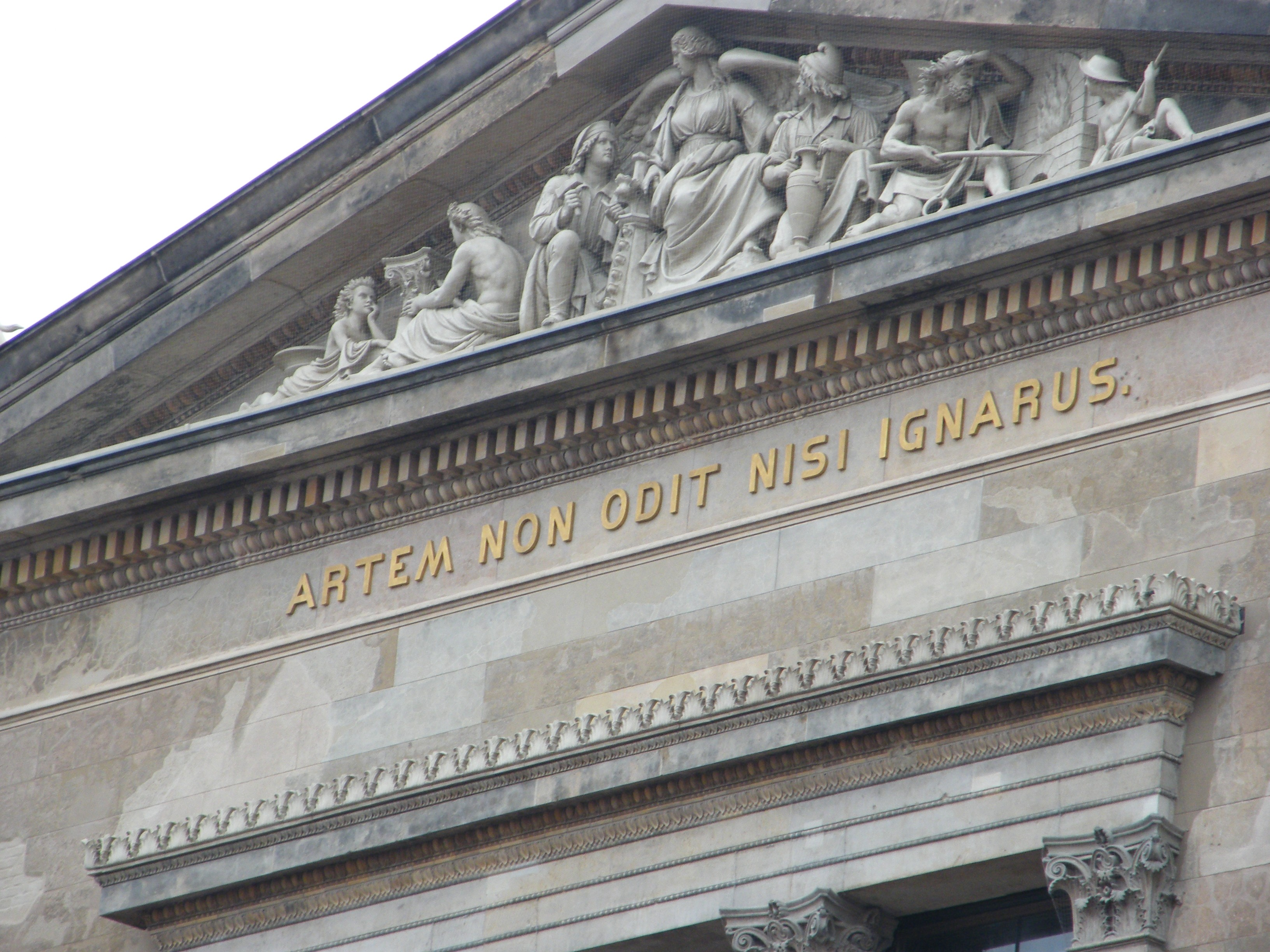 Inschrift am Neuen Museum in Berlin-Mitte